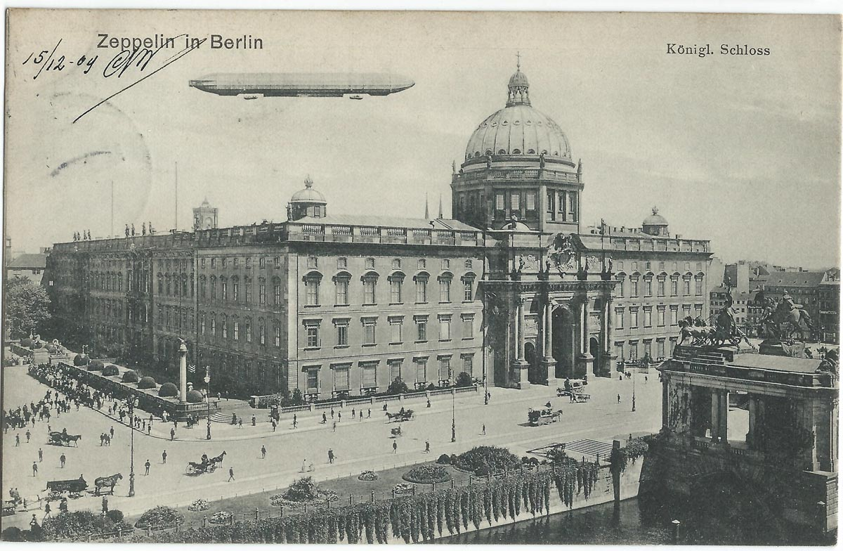 Vue de Berlin au début du XXe siècle (carte postale).